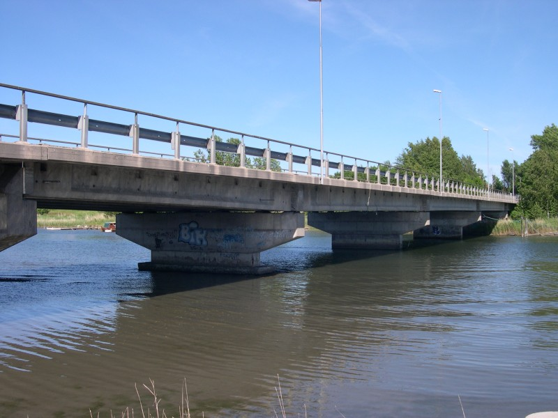 The Føynland bridge between Nøtterøy and Føynland